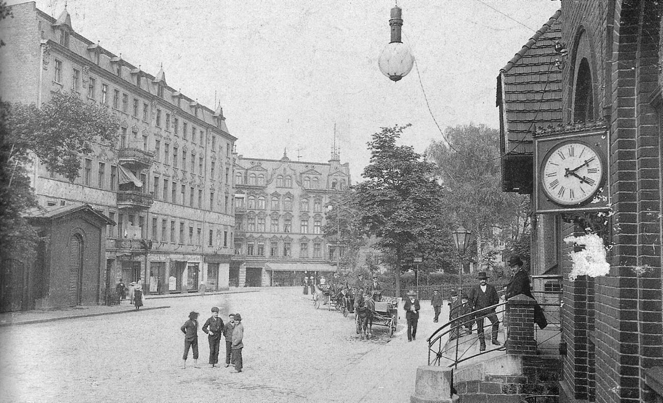 Plac Dworcowy. Grafika opublikowana w książce Bernarda Szczecha "Zabrze na dawnej fotografii".